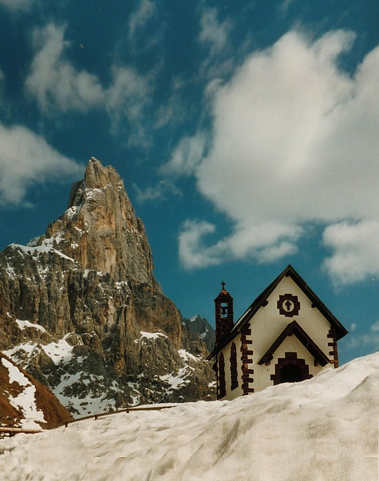 Passo Rolle, Trentino, Italy